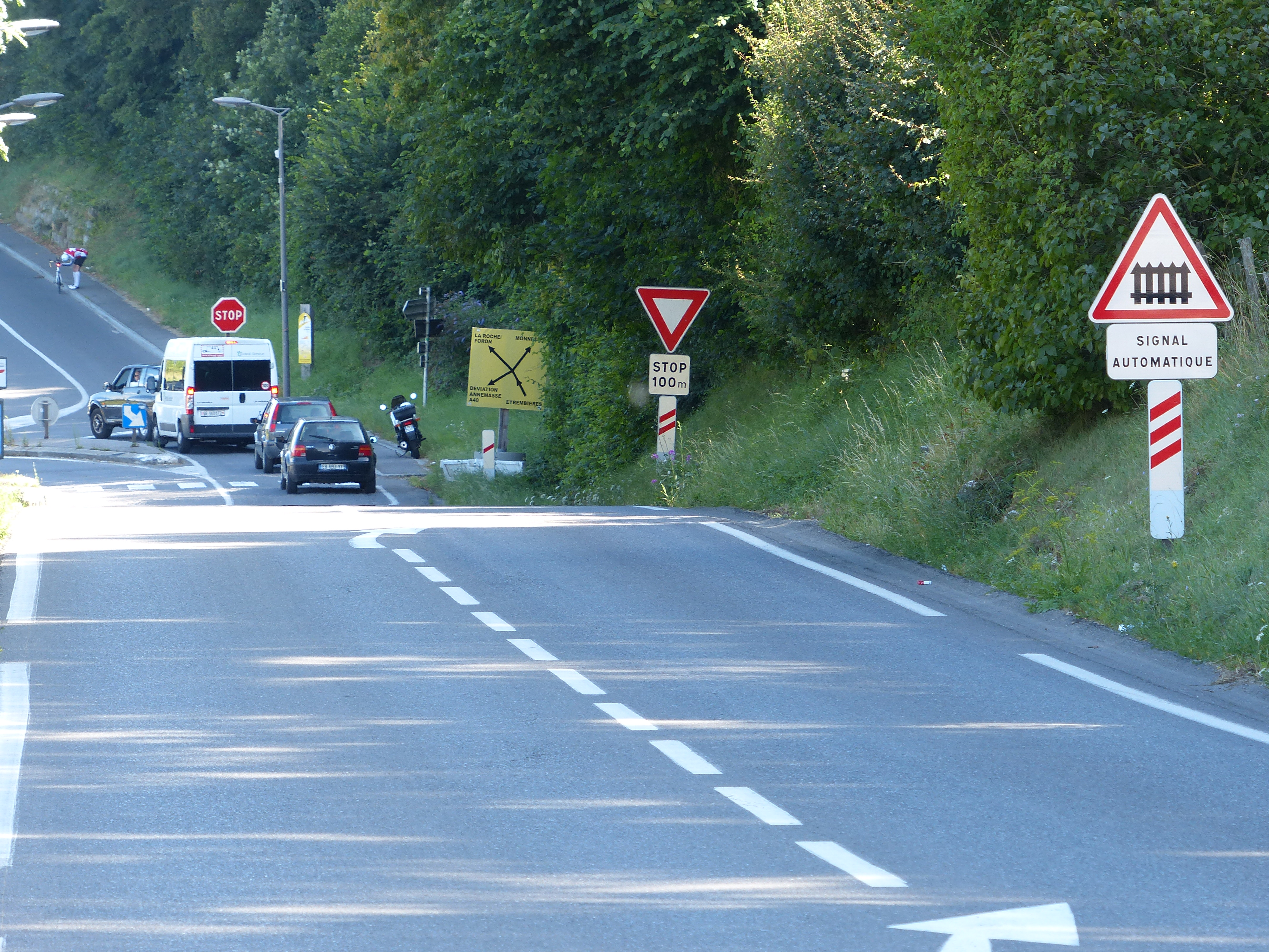 Panneau A7 et trois balises J10 plus loin, à Étrembières